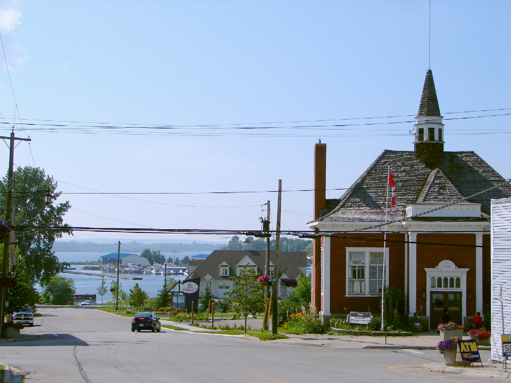 Victoria Harbour, Ontario, Canada